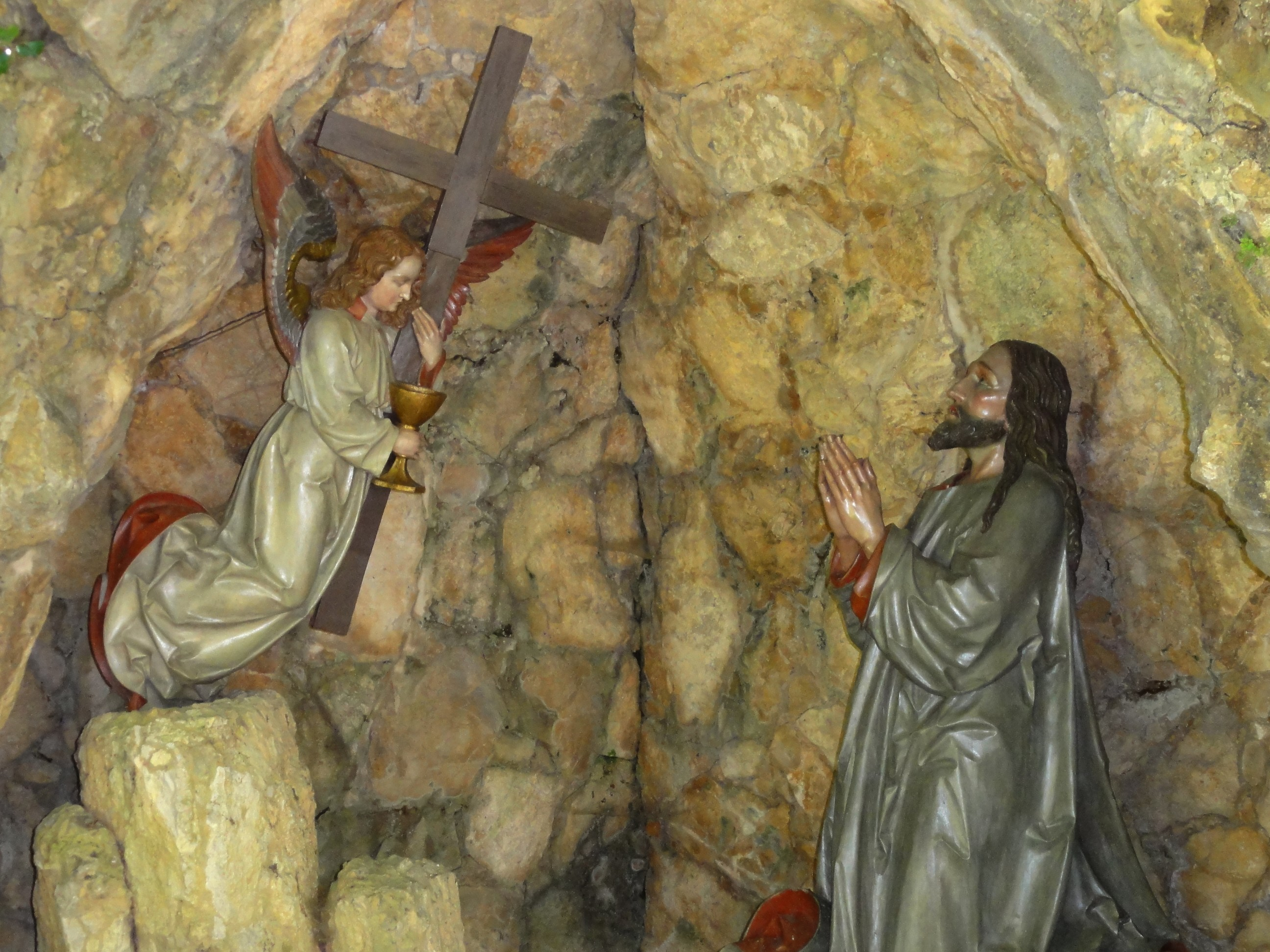 Baden-Württemberg, Bollschweil, Pfarrkirche St. Hilarius